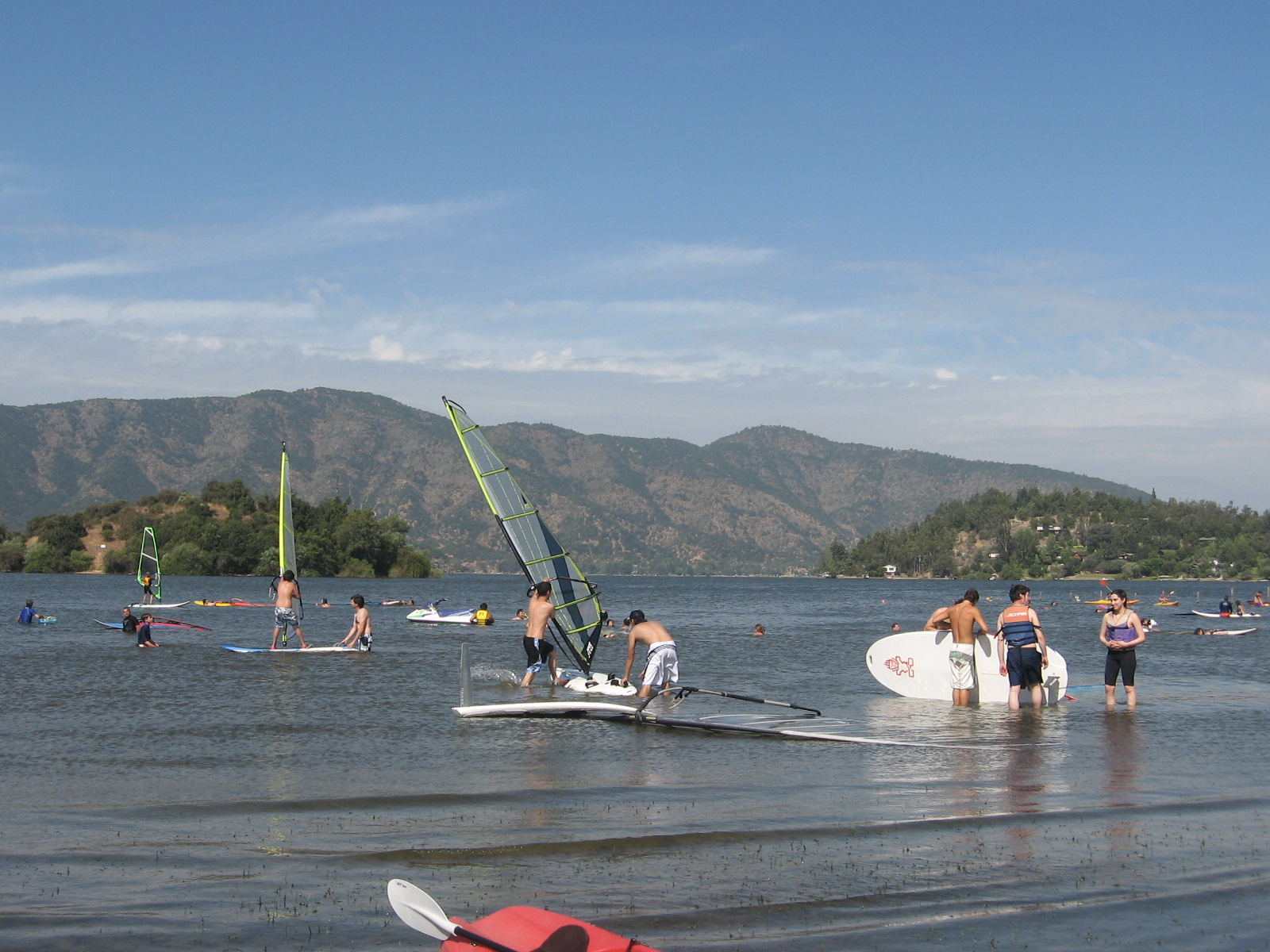 Vista a la Laguna de Aculeo, comuna de Paine, región Metropolitana, Chile in January 2009